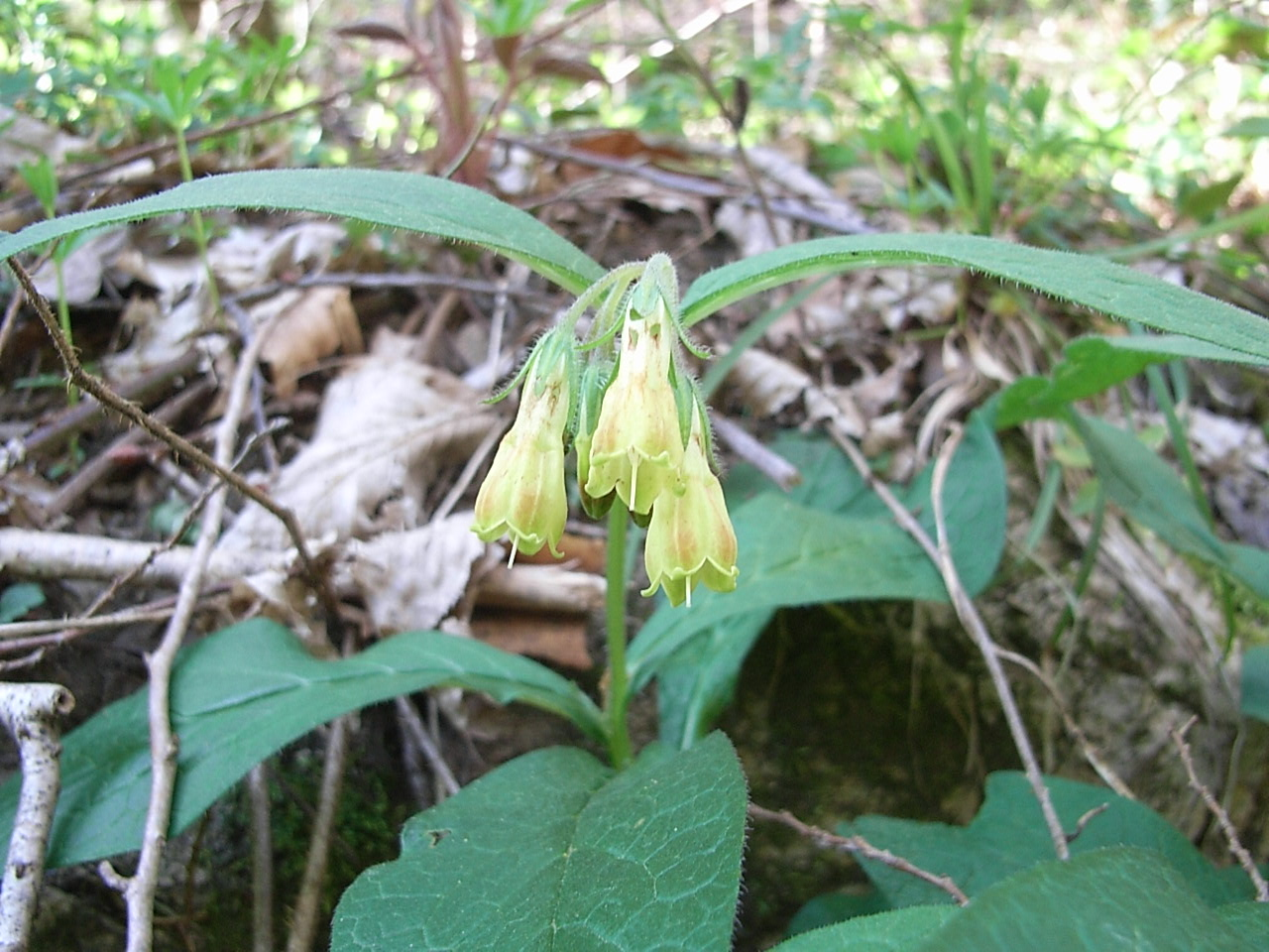 Knoten-Beinwell, Obernzell